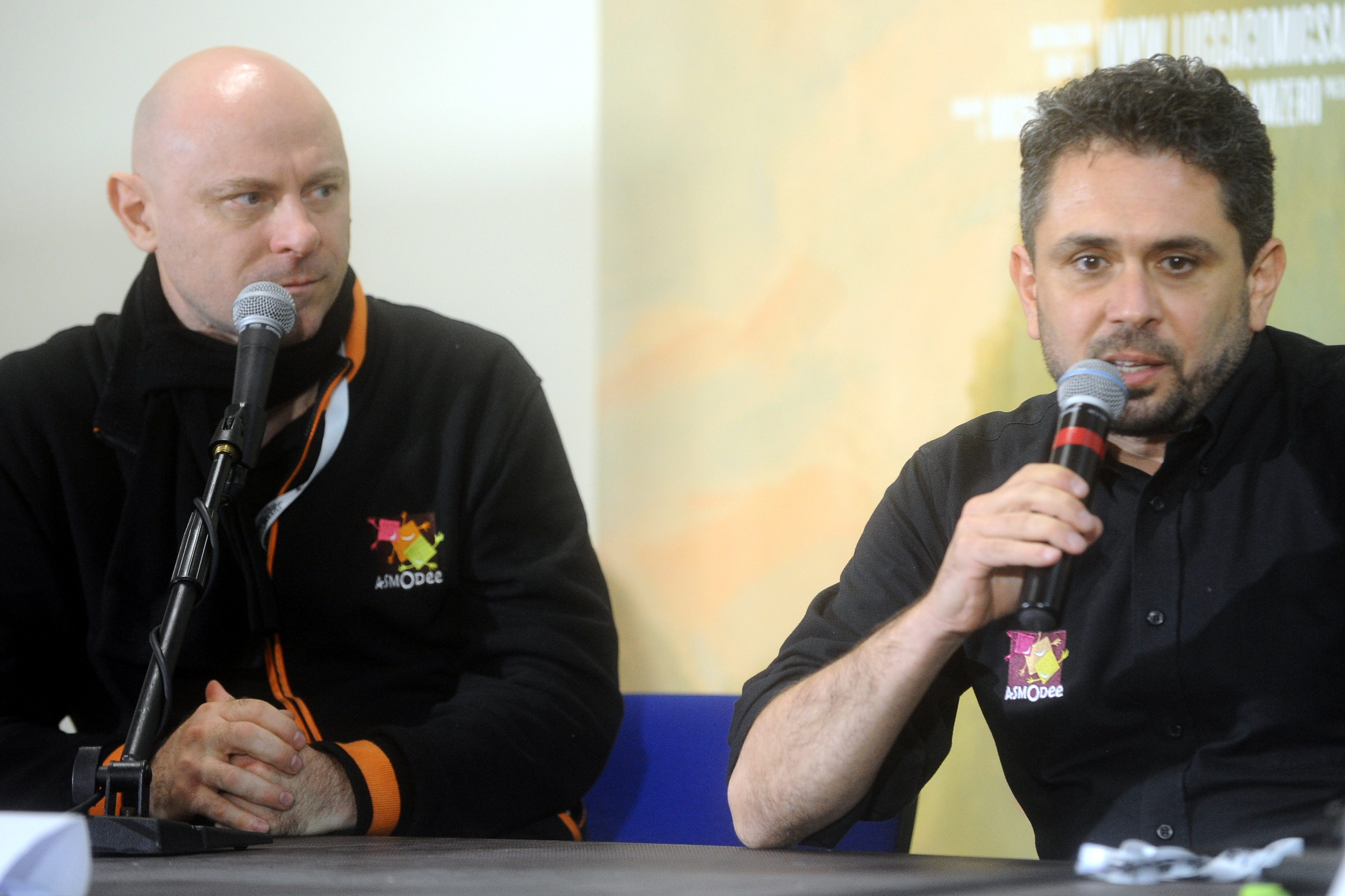 Luca Cattini e Massimo Bianchini di Asterion Press - Asmodee Italia. Sala Ingellis. Lucca.